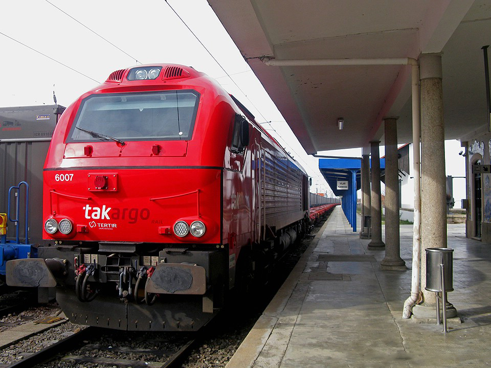 Outro ângulo da locomotiva Vossloh 6007 da Takargo com o serviço especial de transporte de contentores (vazio) Entroncamento - Vilar Formoso